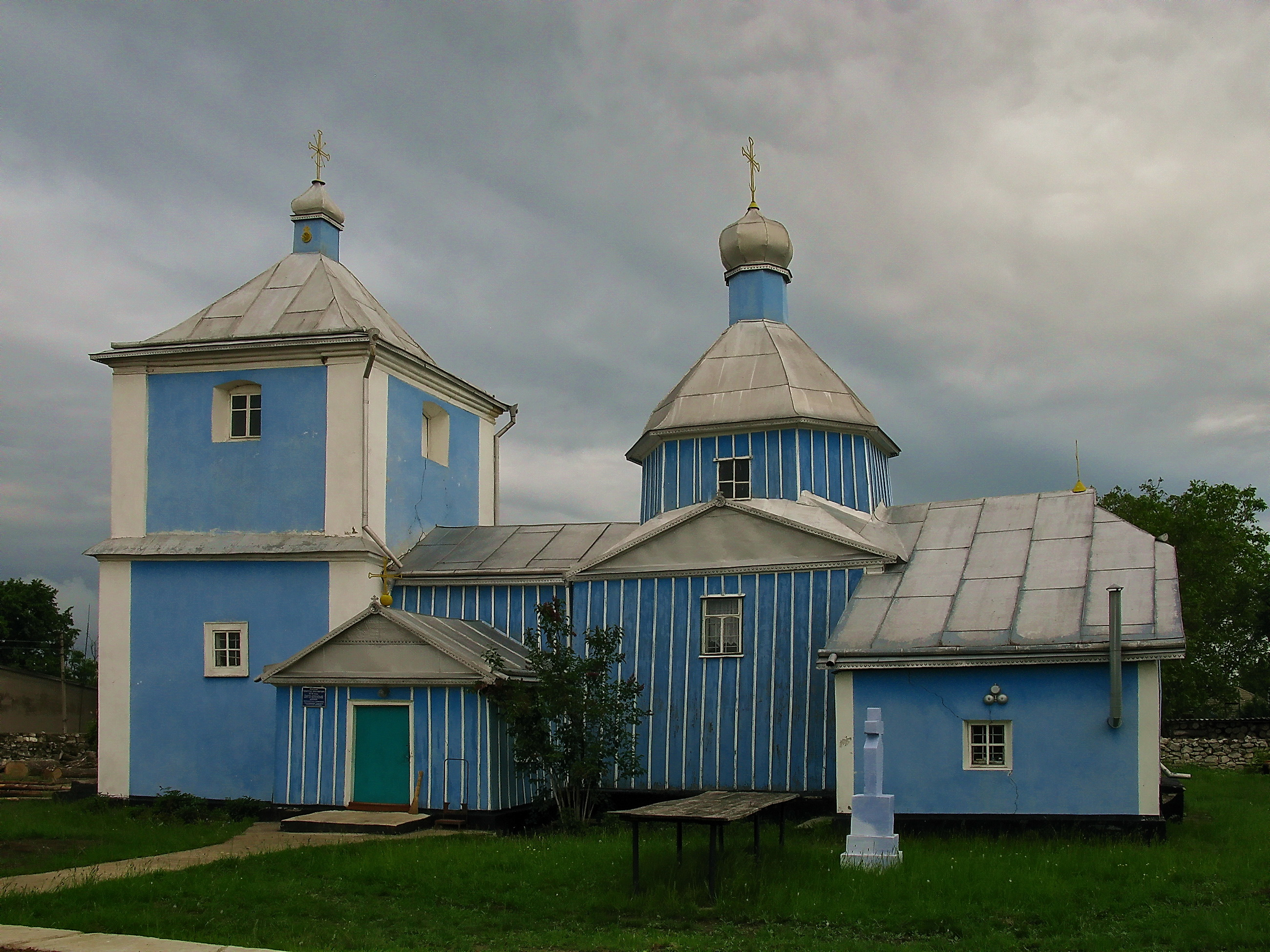 Biserica „Adormirea Maicii Domnului” din Comarova, raionul Chelmenți, regiunea Cernăuți, Ucraina